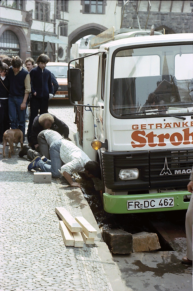 Freiburg i. Br.: Lastwagen im Bächle